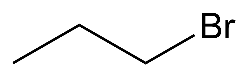 1-broompropaan